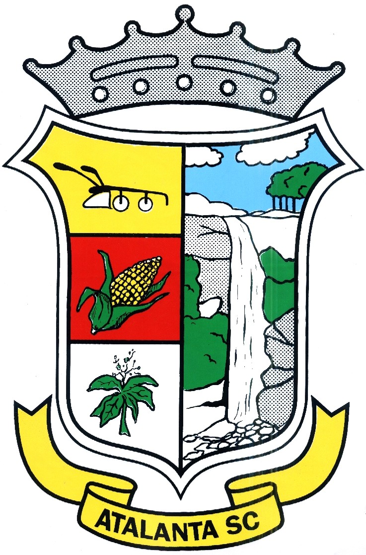 Blason de la municipalité d'Atalanta - Brésil